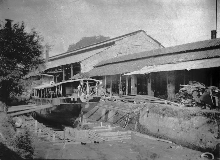 Foto. Album is aangeboden aan Zijne Excellentie Gouverneur-Generaal Mr. D. Fock ter gelegenheid van zijn bezoek aan de fabrieken der Nederlandsch-Indische Industrie te Soerabaia. Het droogdok van de N.V. Nederlandsch Indische Industrie te Soerabaja